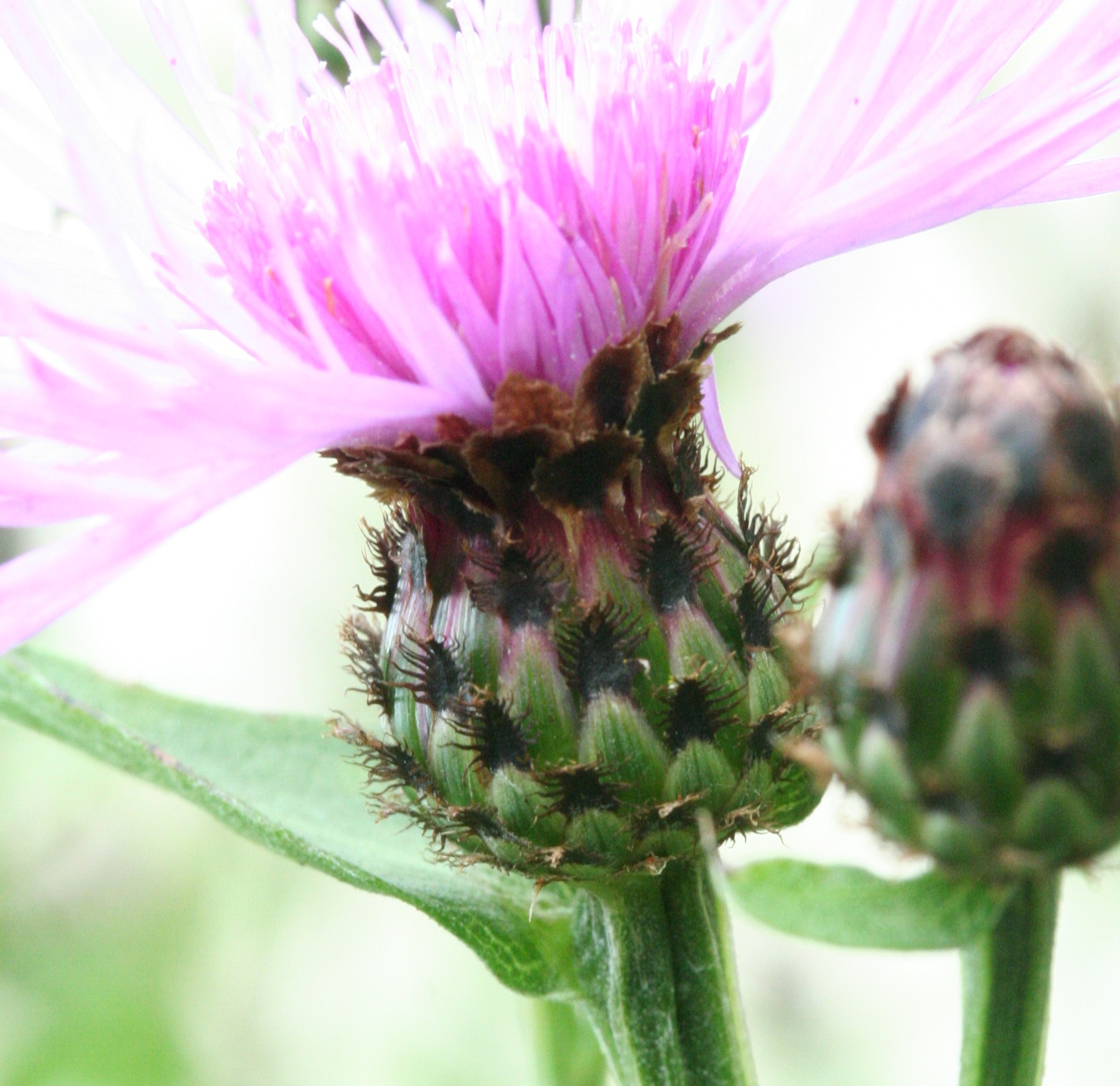 Fiordaliso nerastro - Località: Giardino Botanico Alpino "Giangio Lorenzoni", Pian Cansiglio, Tambre d'Alpago (BL), 1000 m s.l.m.